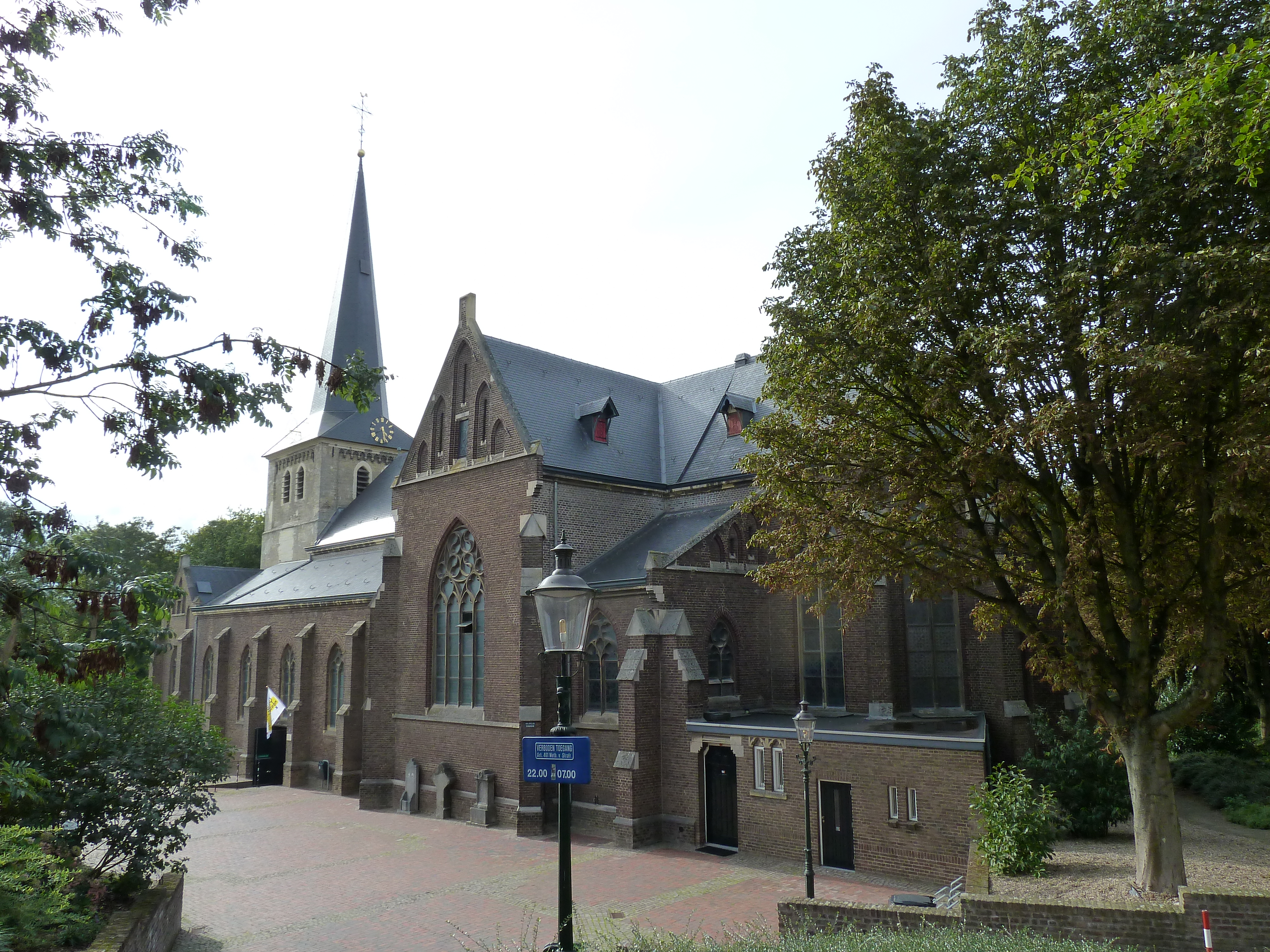 Sint-Martinuskerk, Stein, Limburg, Nederland